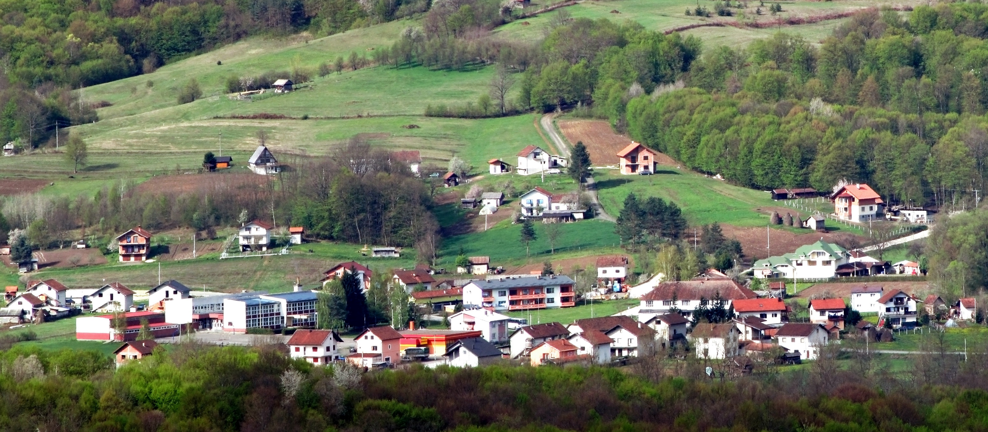 Selo Čečava © Suvajac